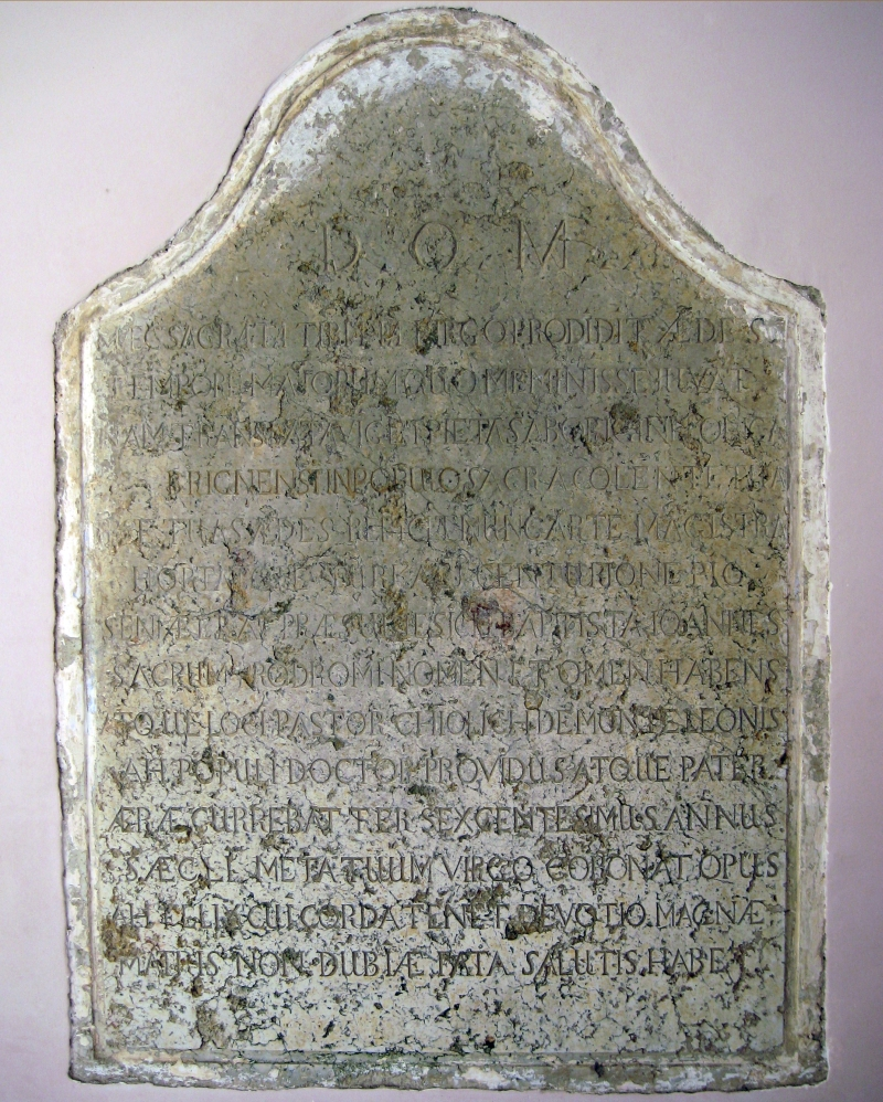 Pavlinska natpisna ploča iz 15. stoljeća na crkvi Uznesenja Marijina u Brinju, Croatia